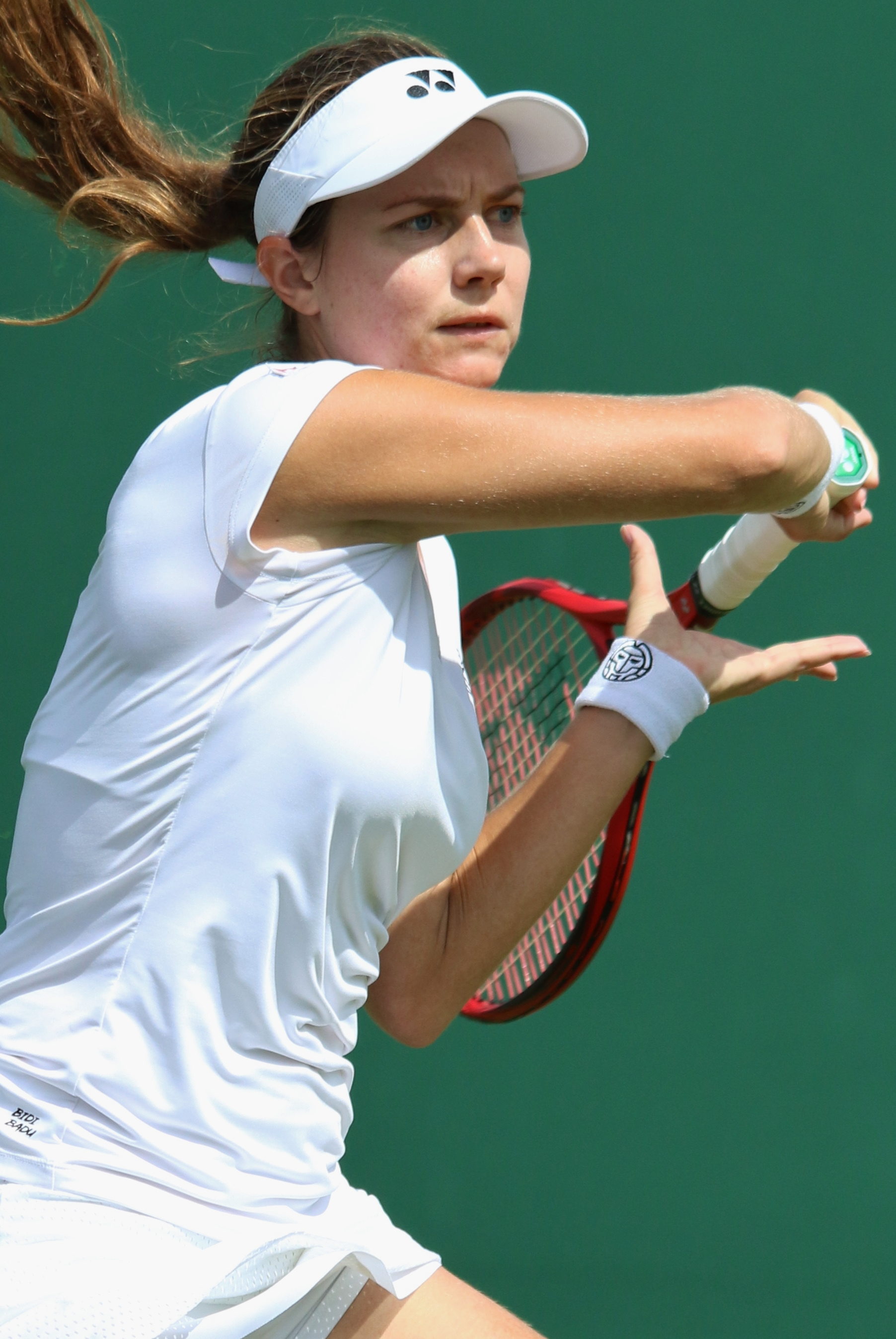 Voegele WM19 (24)